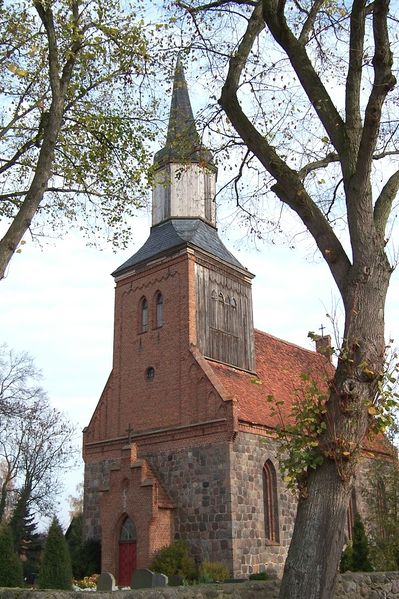 Die Dorfkirche von Stendell